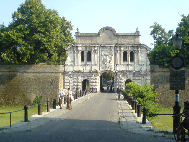 Ingresso fortezza Cittadella (Parma) Foto che ho scattato nel luglio 2006